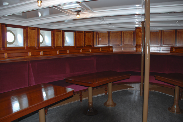 1. plass salong i DS Stord, 22. mai 2008.